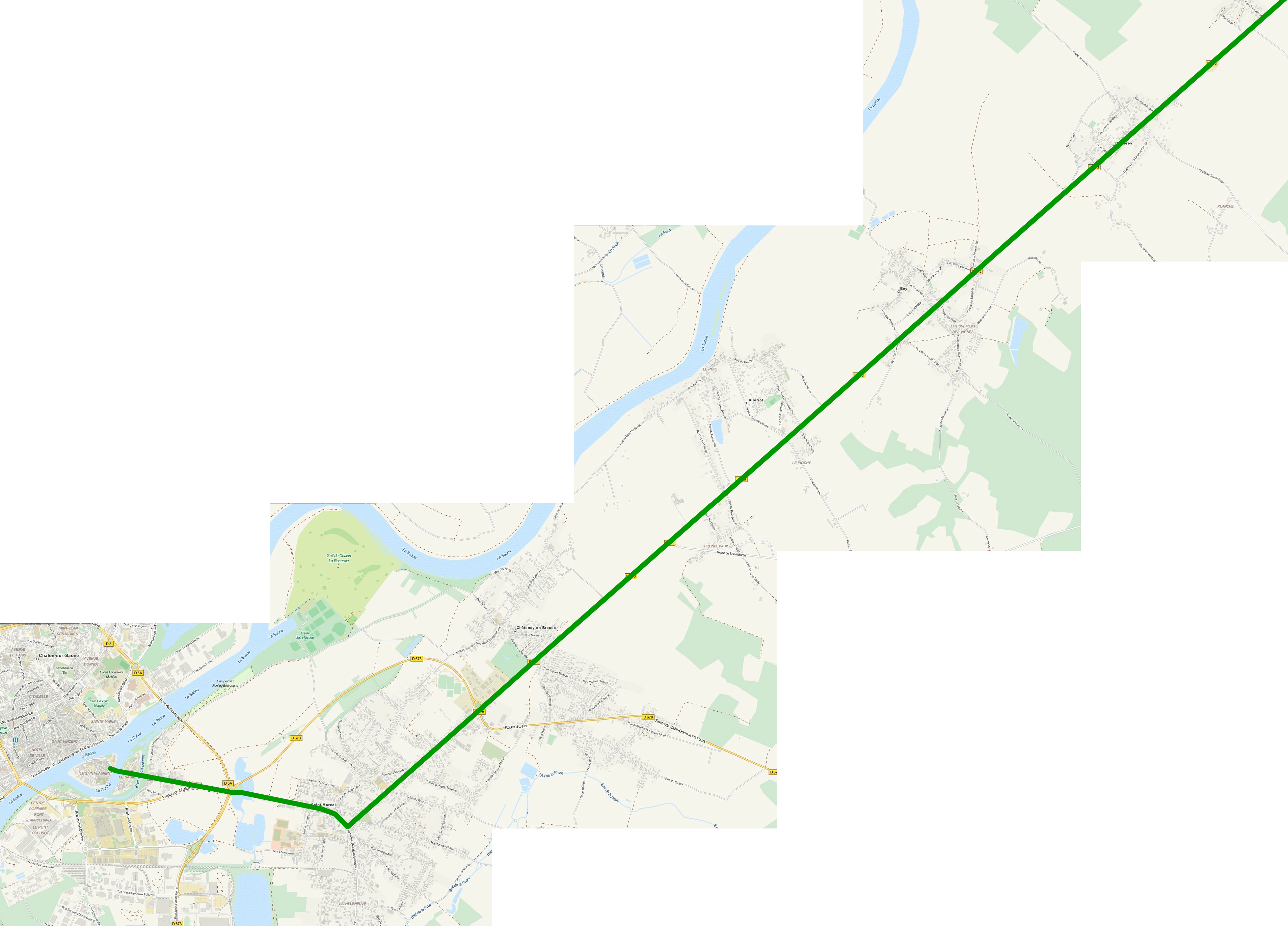 Detailkarte der Römerstrasse von Chalon-sur-Saône nach Besançon - Teilstück Chalon-sur-Saône bis Damerey Carte de détail de la voie romaine de Chalon-sur-Saône à Besançon - Partie de Chalon-sur-Saône à Damerey This map may be incomplete, and may contain errors. Don't rely solely on it for navigation.